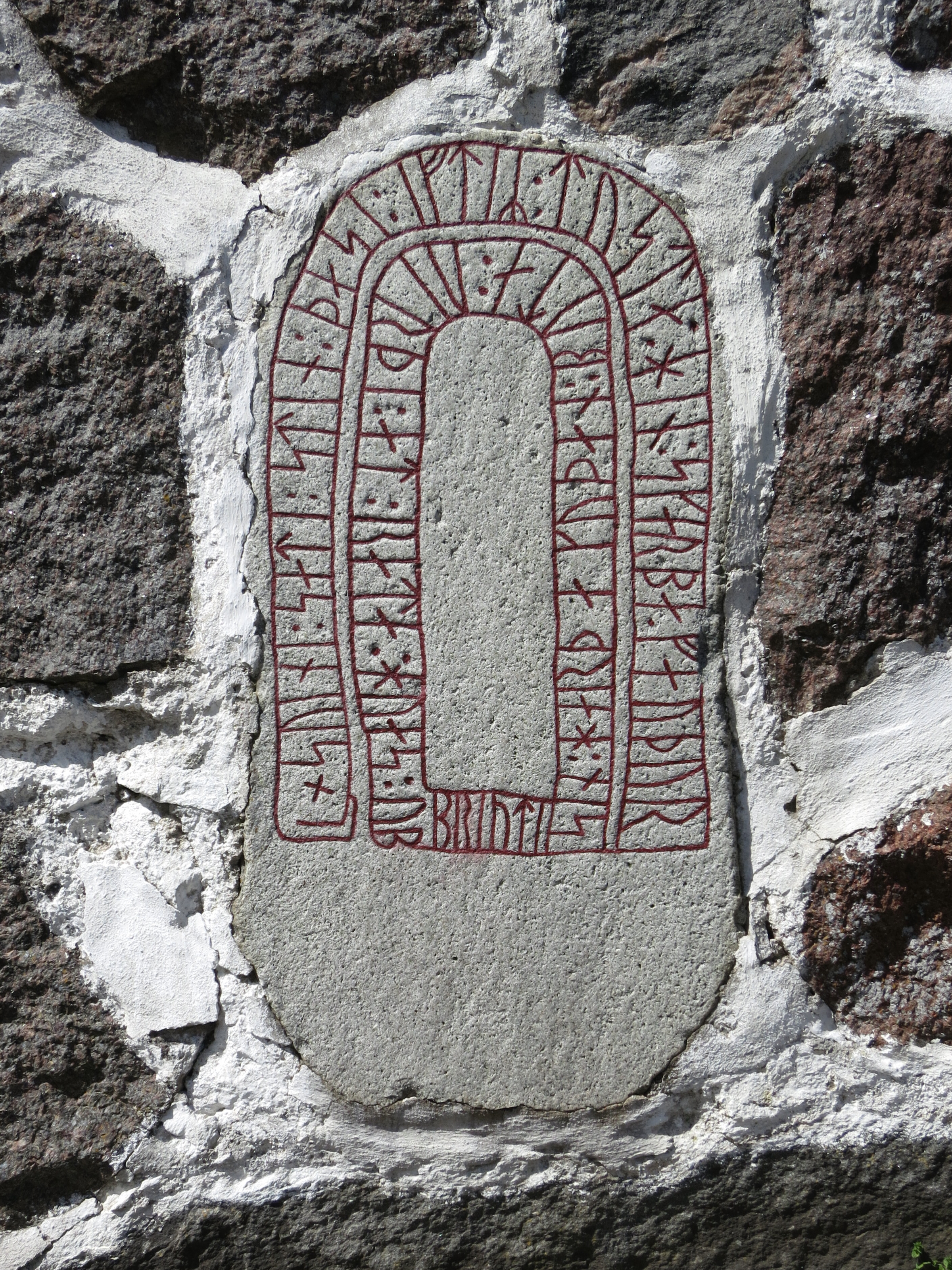 Runstenen Glemmingestenen DR338